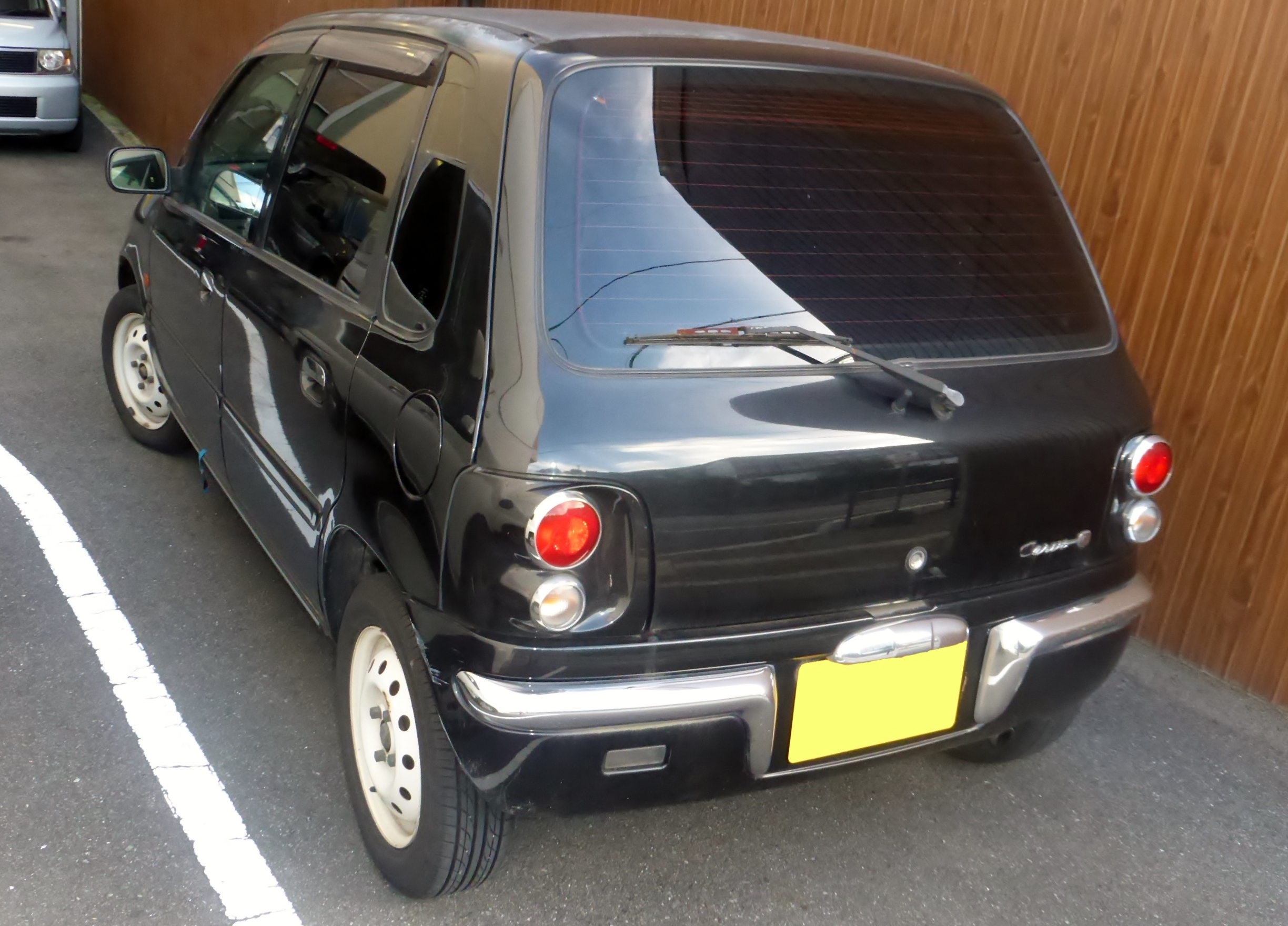 CN22S型スズキ・セルボCをリアから撮影。